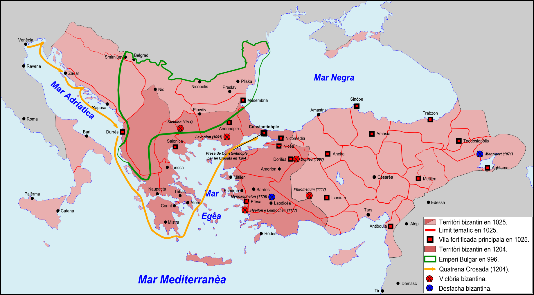 Empèri Bizantin (1025-1204) e Khanat Bulgar (996).